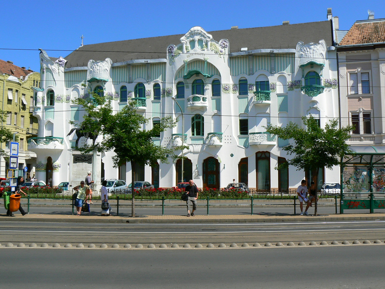 A Reök Palota főhomlokzata